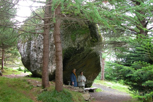 Big stone, Kunoy